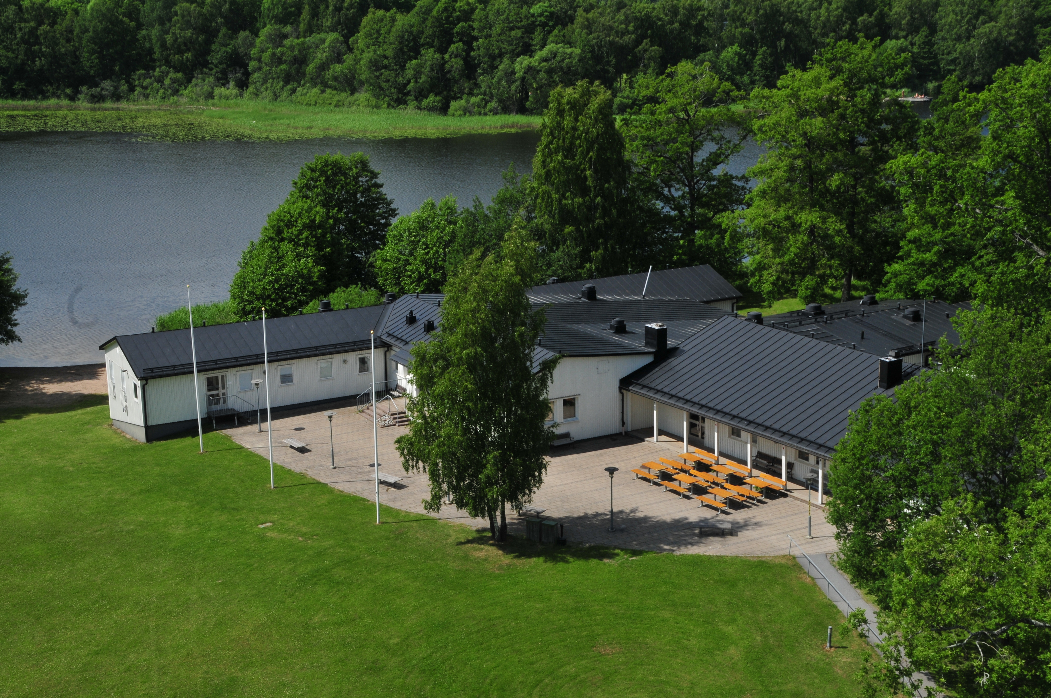 Bild av stradhuset Ågesta Folkhögskola